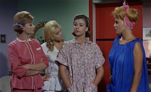 Dalla sinistra Sandra Mondaini, Ingrid Simon, Lorella De Luca e Valeria Fabrizi in una scena di Caccia al marito (1960)